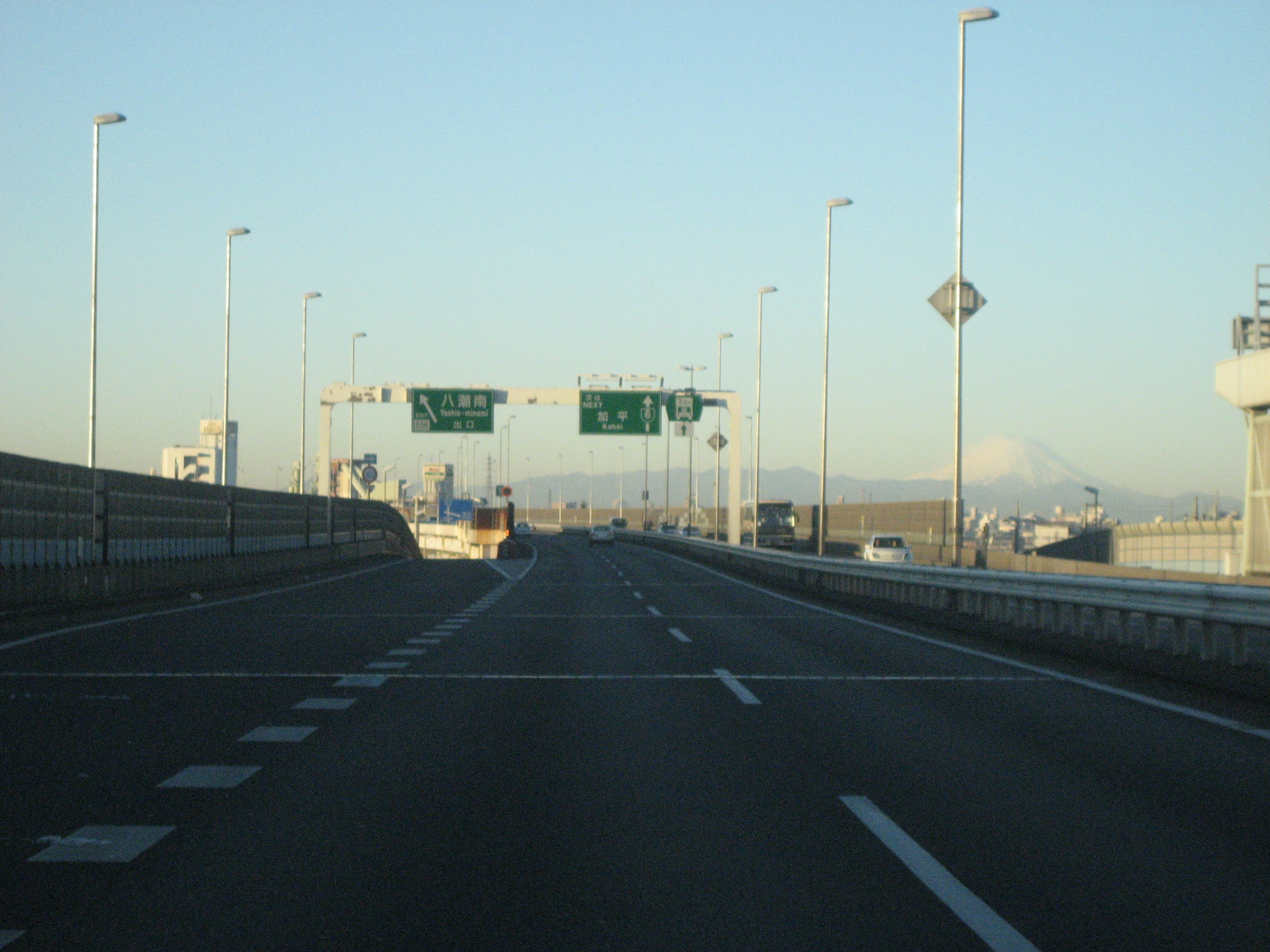 首都高速八潮南出入口（上り）